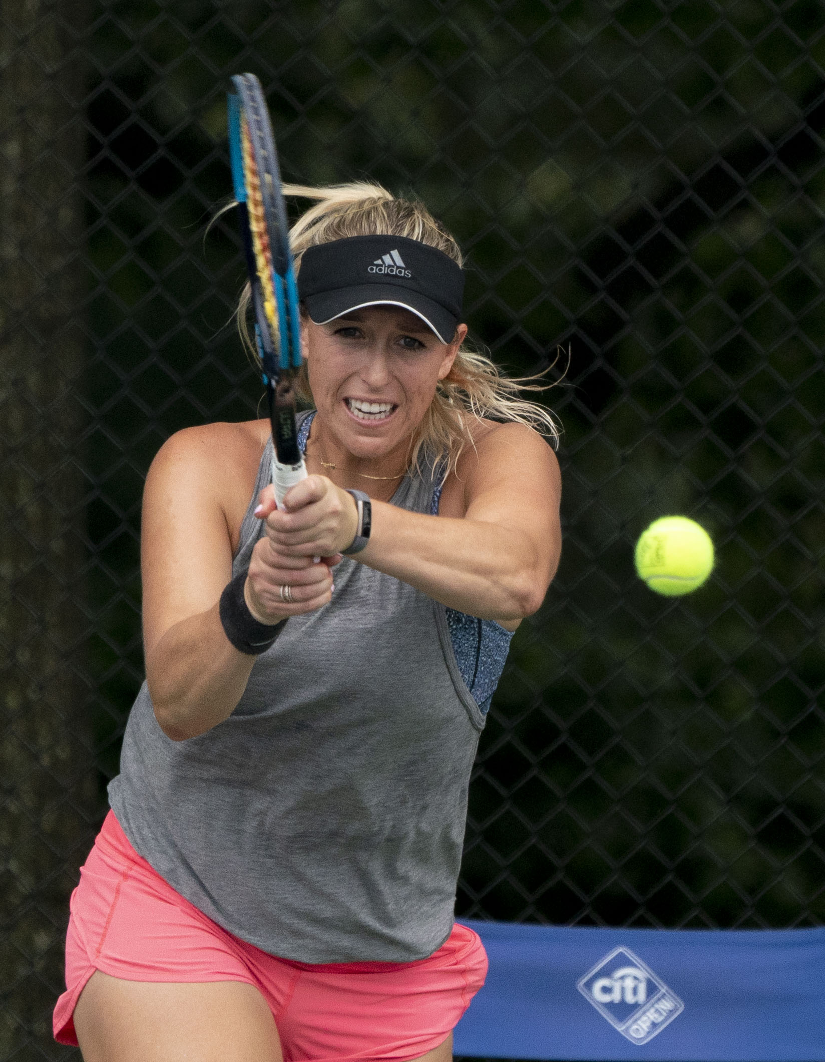 2018 Citi Open Tennis